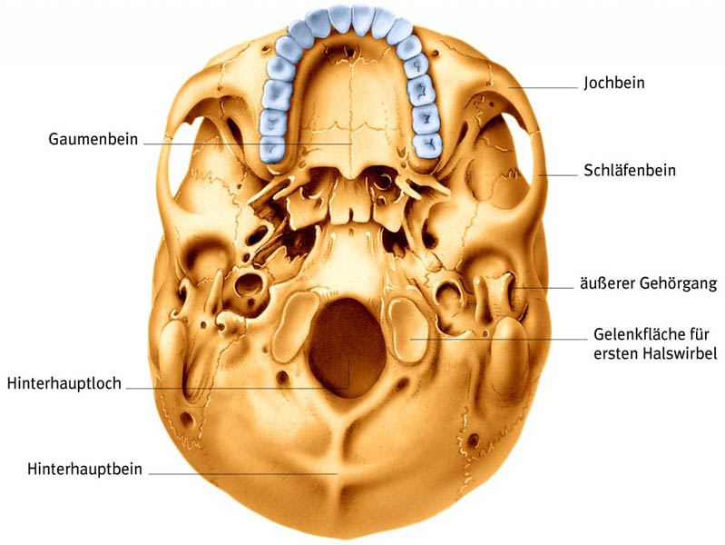 Menschlicher Schädel mit Schädelbasis von unten gesehen (Modell)